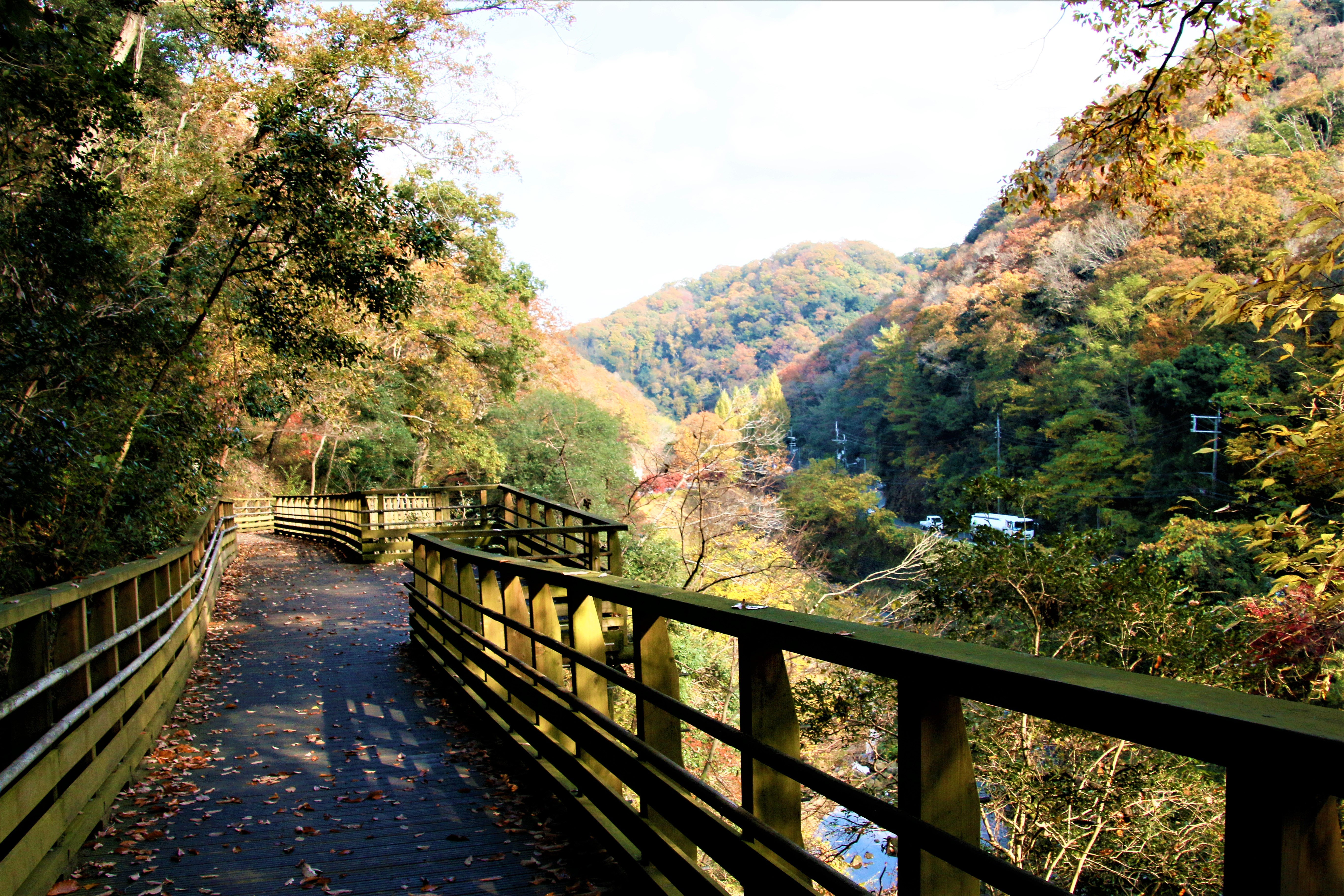 天野川に架かる木道 2016-11-22